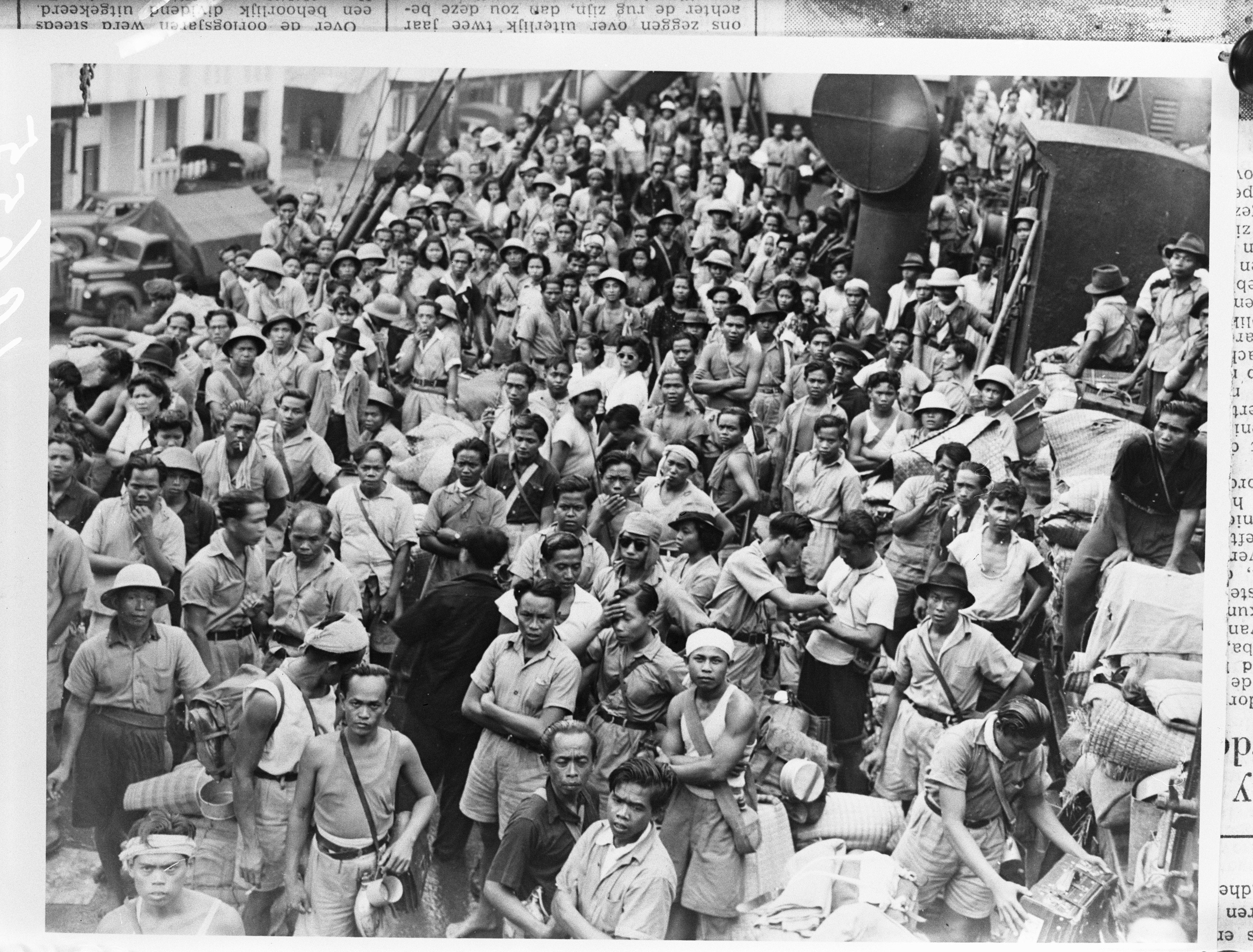 Collectie / Archief : Fotocollectie Anefo Reportage / Serie : [ onbekend ] Beschrijving : Aankomst Romushas uit Japan in Nederlands-Indië Datum : 4 december 1946 Locatie : Indonesië, Nederlands-Indië Trefwoorden : aankomsten, dwangarbeiders, tweede wereldoorlog Fotograaf : NIGIS [Netherlands Indies Government Information Service] Auteursrechthebbende : Nationaal Archief Materiaalsoort : Glasnegatief Nummer archiefinventaris : bekijk toegang 2.24.01.09 Bestanddeelnummer : 901-9655